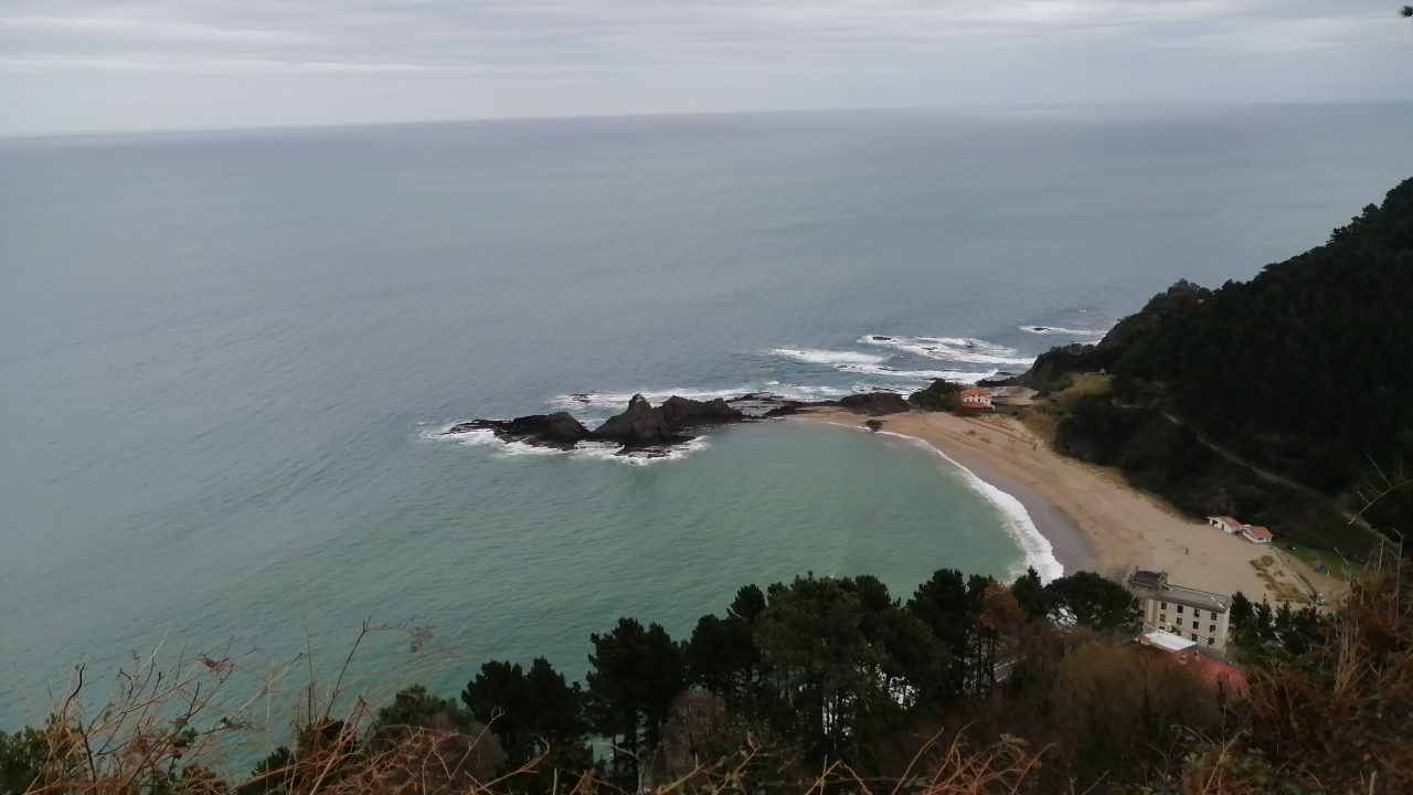 Saturraran hondartza Akilla menditik